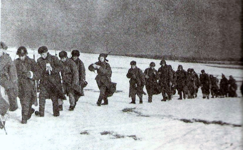 Fucilieri sovietici in movimento nella steppa dopo lo sfondamento del fronte del Don